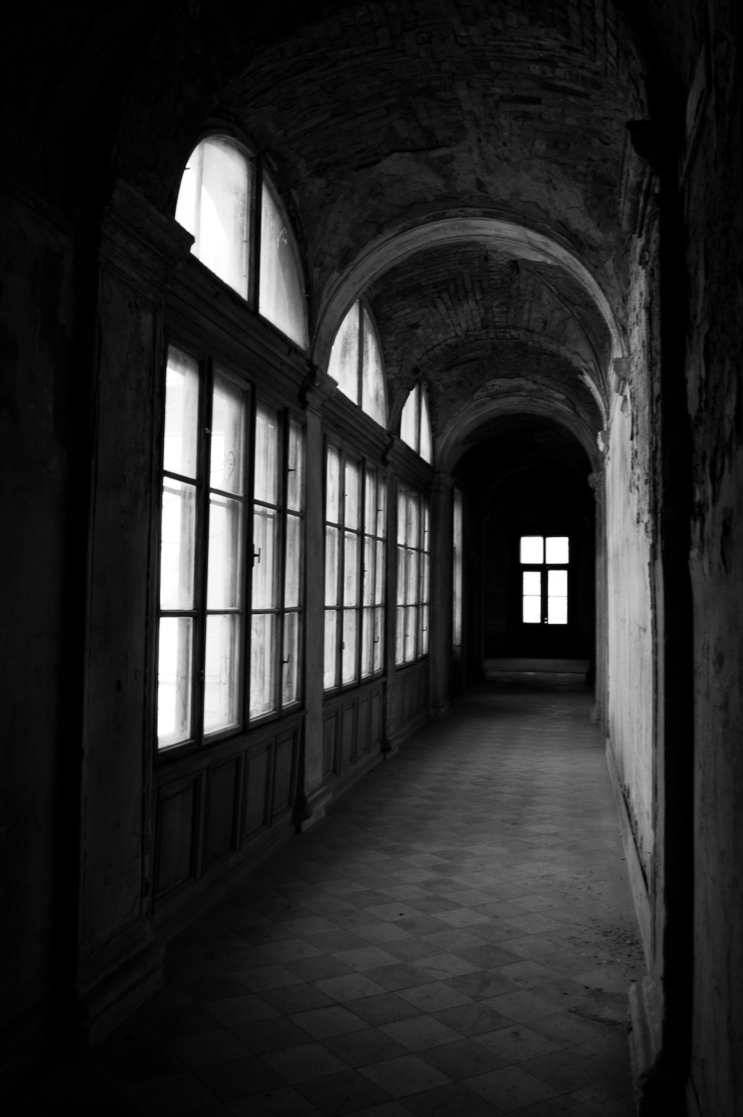 Schossberger-kastély (Tura, Kossuth u.)